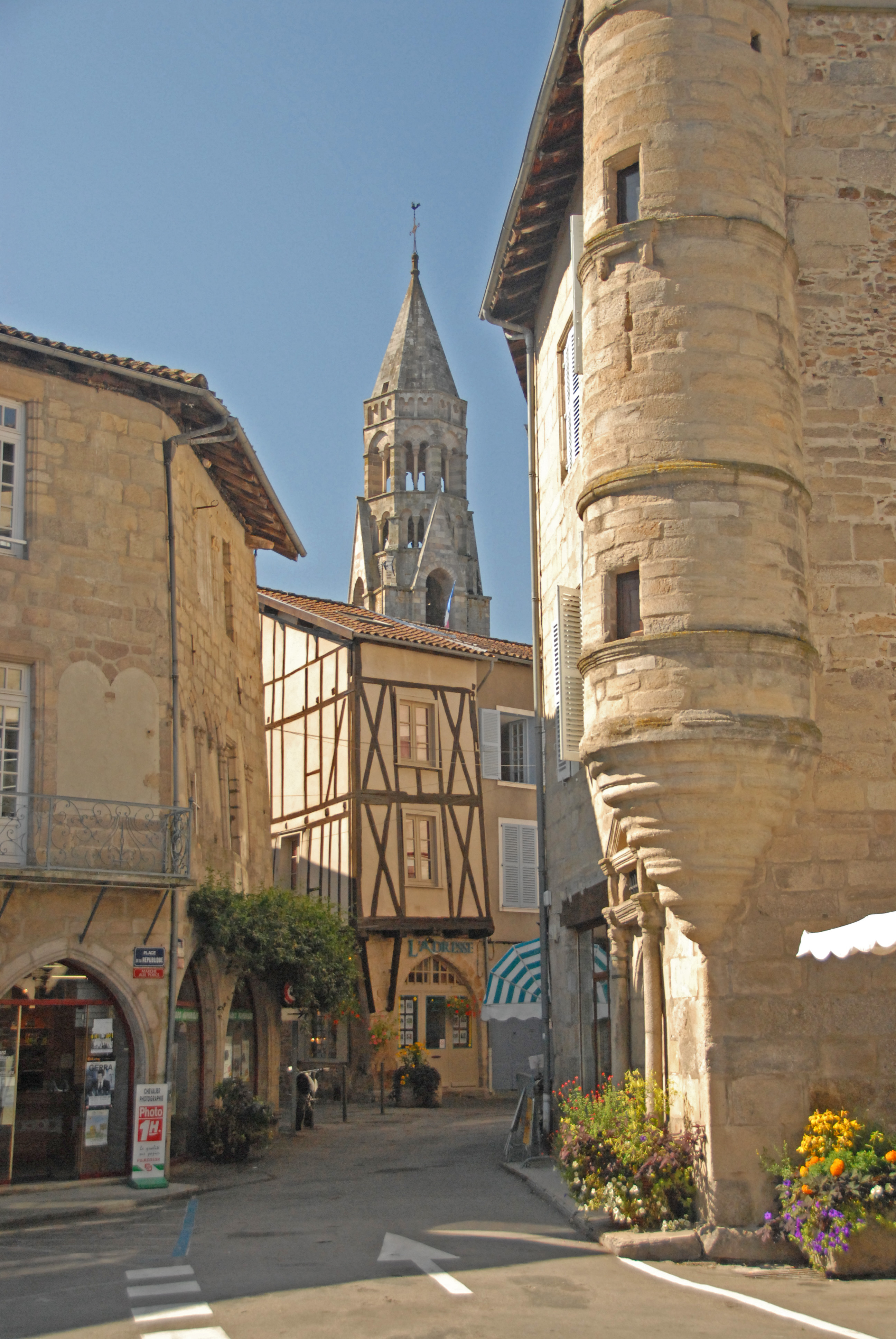 Stiftskirche St.-Léonard-de-Noblat, Glockenturm aus Altstadt